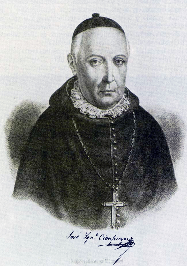 José Ignacio Cienfuegos Arteaga (Santiago, 1 de octubre de 1762 - Talca, 8 de noviembre de 1847) fue un clérigo domínico chileno. Fue un héroe de la independencia de su país, y senador y presidente del Congreso de la República de Chile. Ocupó también diversos cargos eclesiásticos en Santiago de Chile, Concepción y la Santa Sede.